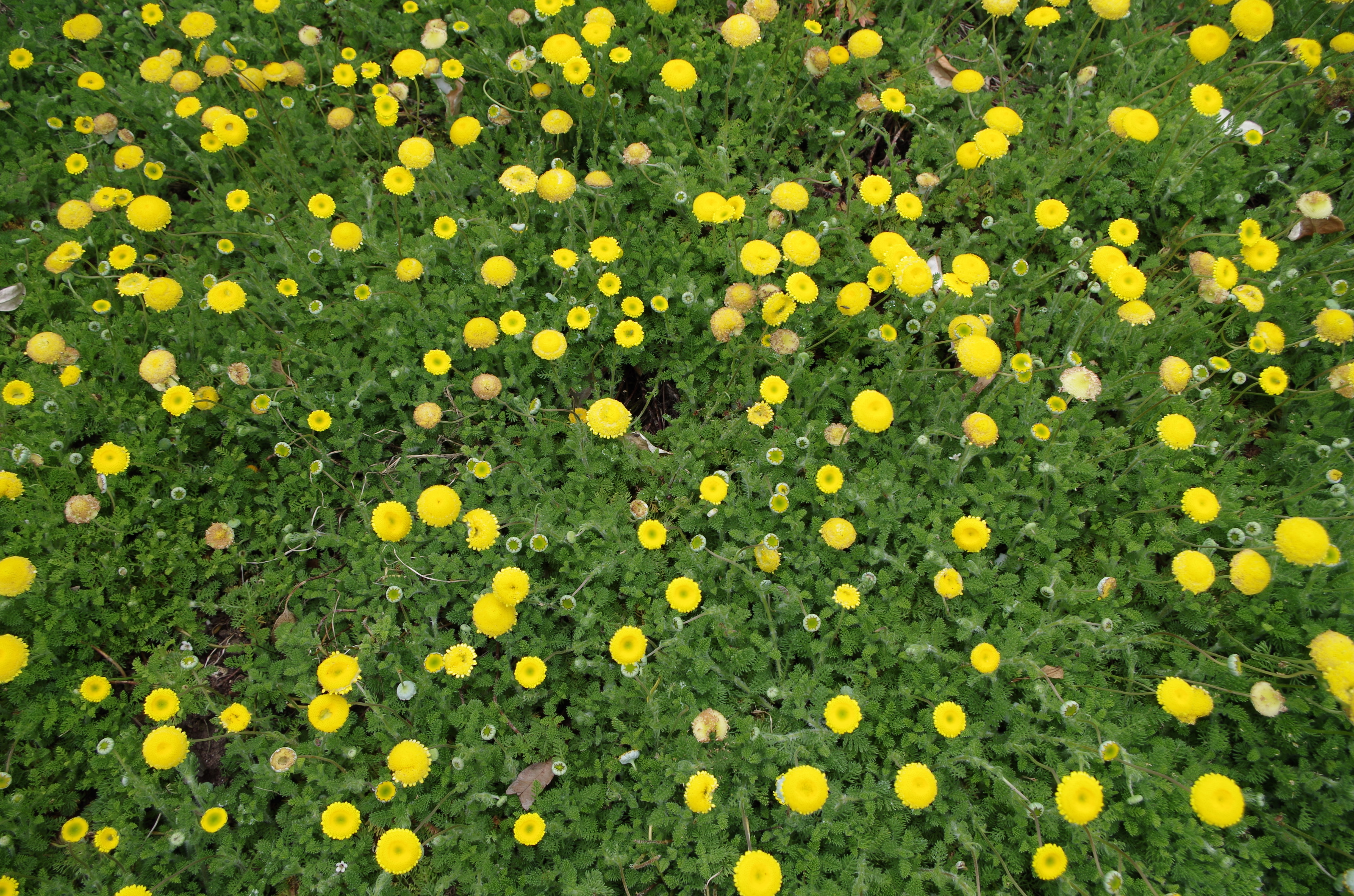 Cotula lineariloba - Jardin exotique et botanique de Roscoff